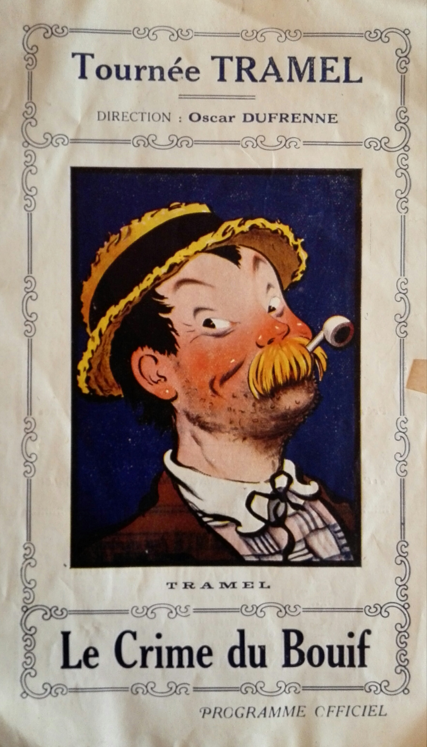 Illustration du personnage TRAMEL créé par Antoine Félicien Martel, auteur inconnu.